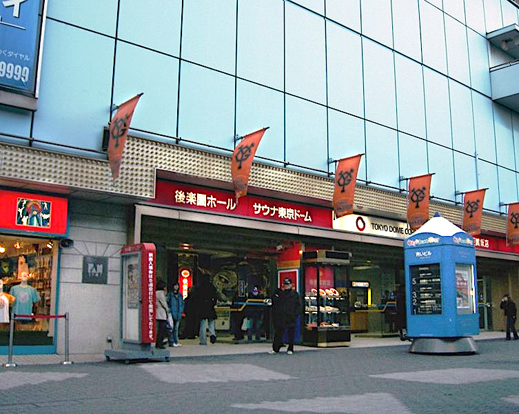 Korakuen_Hall Tokyo Japan